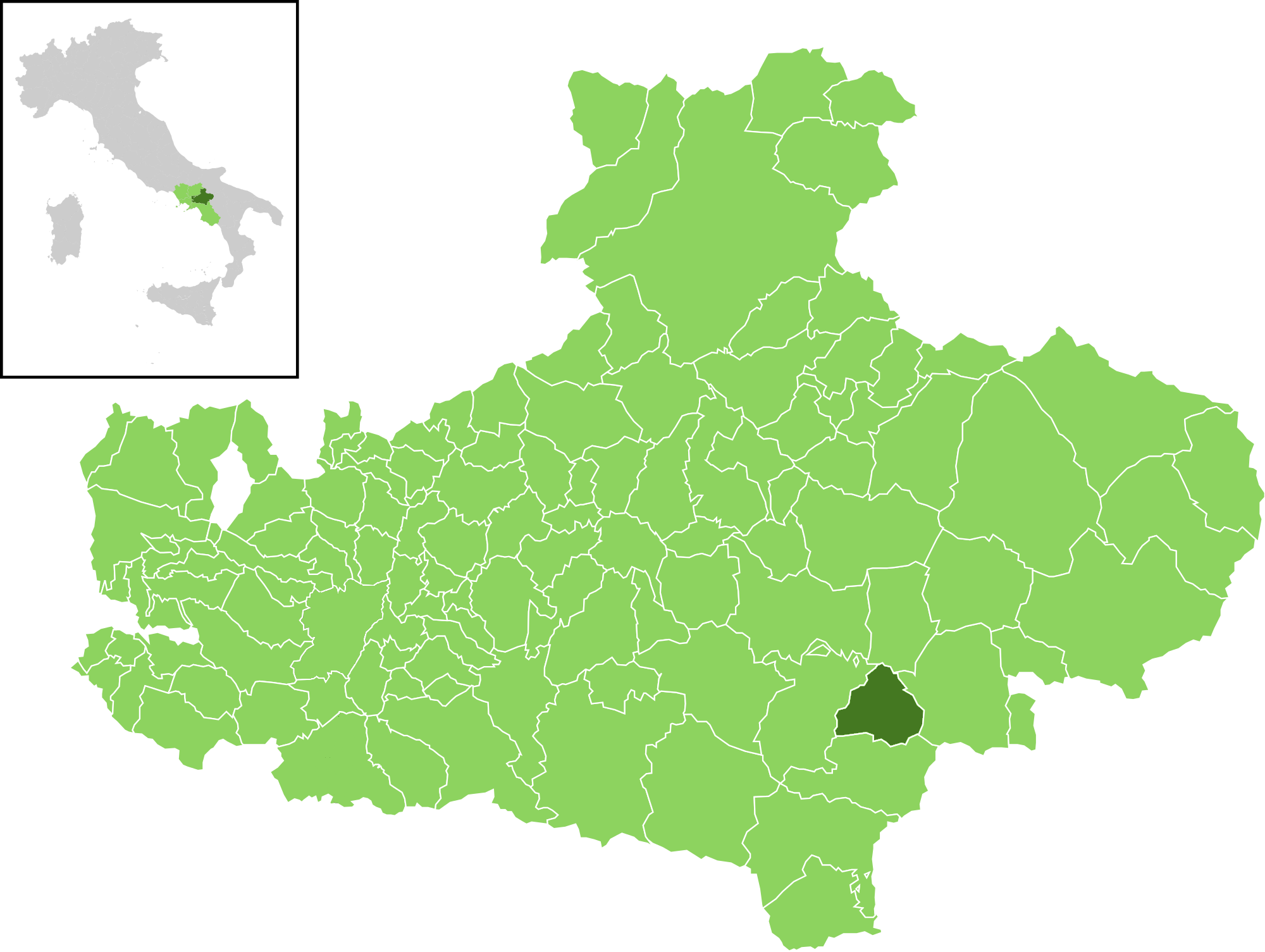 Posizione del comune all'interno della provincia di Avellino